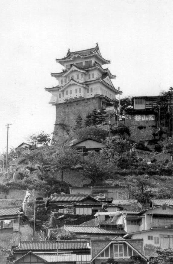 尾道城 昭和43年頃